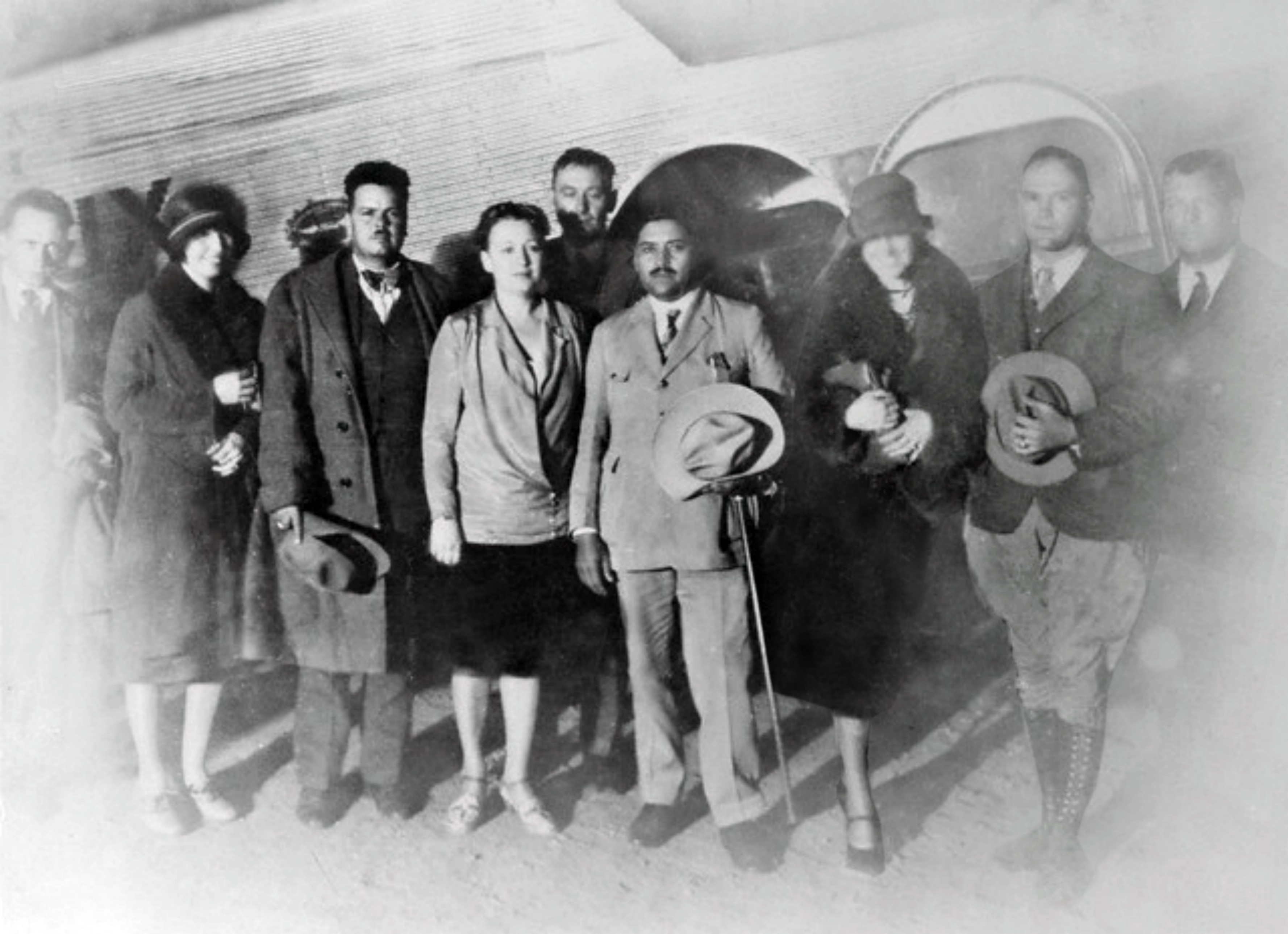 El Gral. Matias Ramos en al Paso, Tx. el 14 de marzo de 1929, después de encabezar la defensa de Ciudad Juárez, cuando la asonada militar escobarista de 1929.